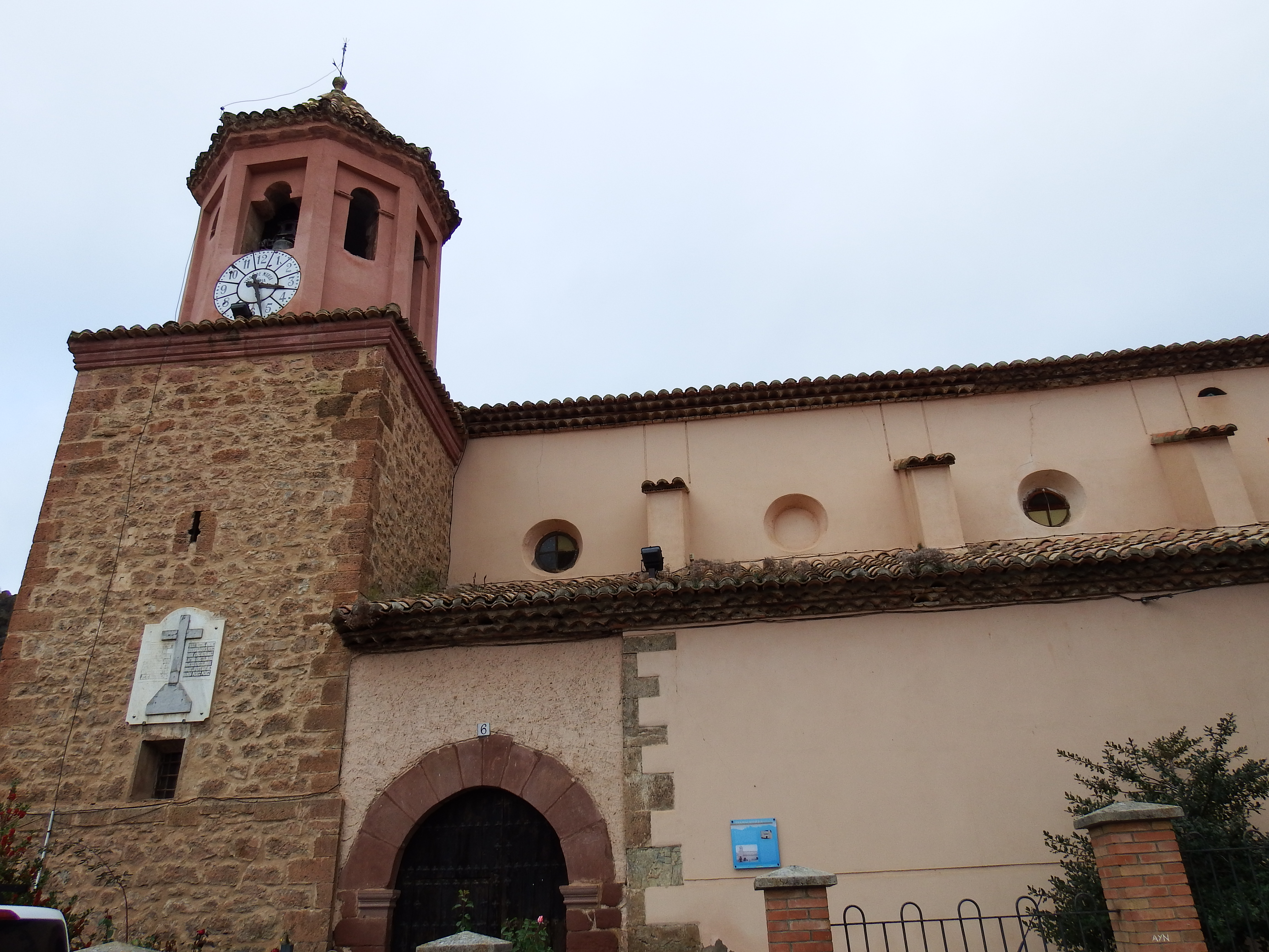 Tramacastilla